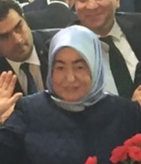 Semiha Yıldırım